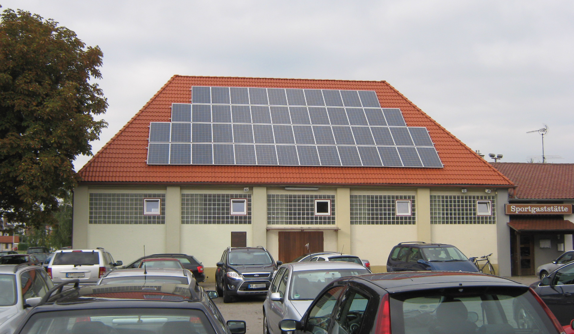 Die Langgass-Turnhalle in Mössingen mit Gedenktafel zum Mössinger Generalstreik gegen die Machtergreifung von Adolf Hitler. Die Halle wurde von den Streikwilligen am 30. und 31. Januar 1933 als Versammlungsort genutzt. Der Text der Inschrift auf der Gedenktafel lautet: STADT MÖSSINGEN LANGGASS-TURNHALLE" ZUM GEDENKEN AN DIE FRAUEN UND MÄNNER DIE VON HIER AUS AM 31. JANUAR 1933 DEN MÖSSINGER GENERALSTREIK GEGEN HITLER UND DIE NAZIDIKTATUR WAGTEN